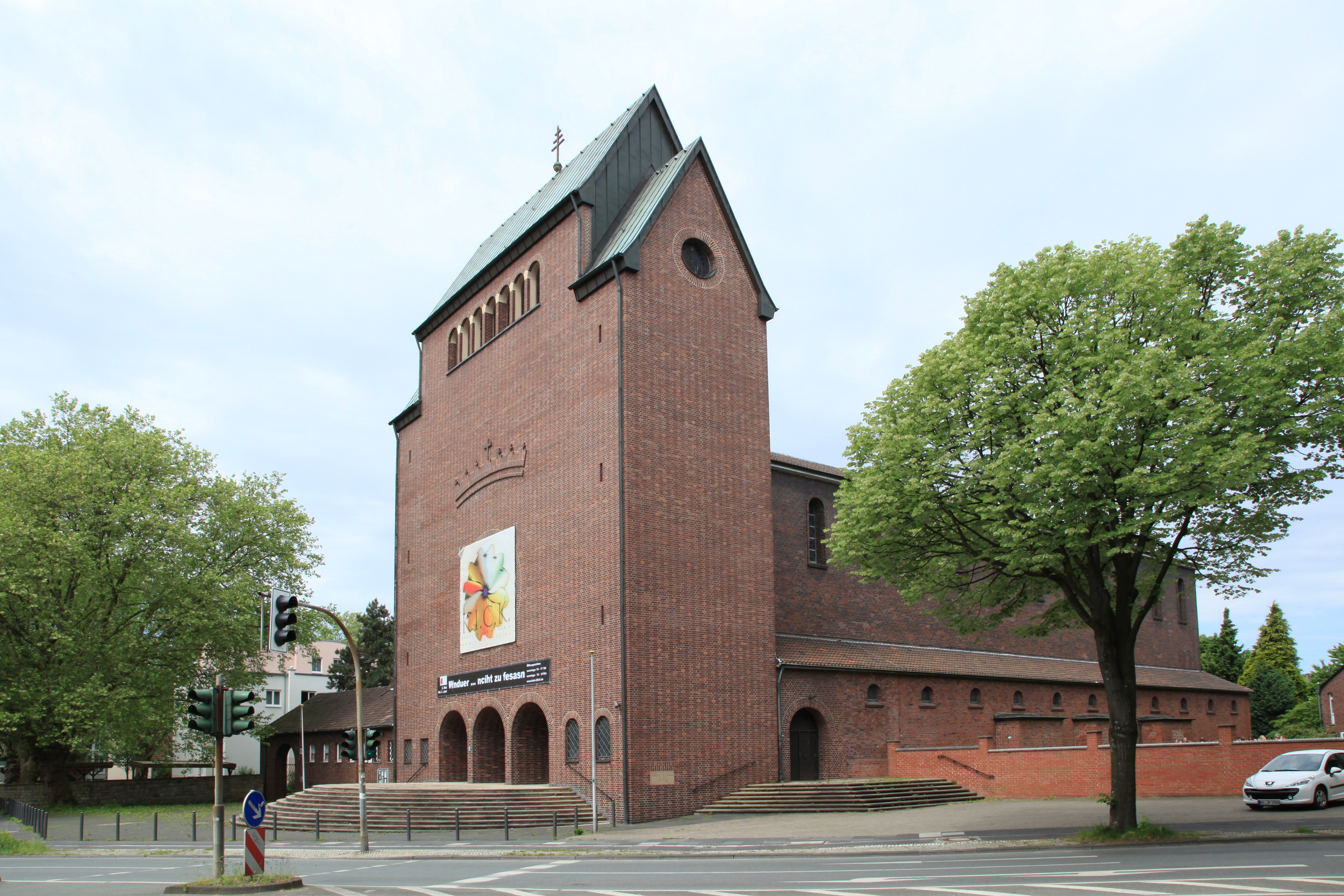 Christ-König-Kirche, Ecke Steinring/Düppelstraße in Bochum